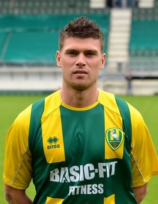 Danny Holla